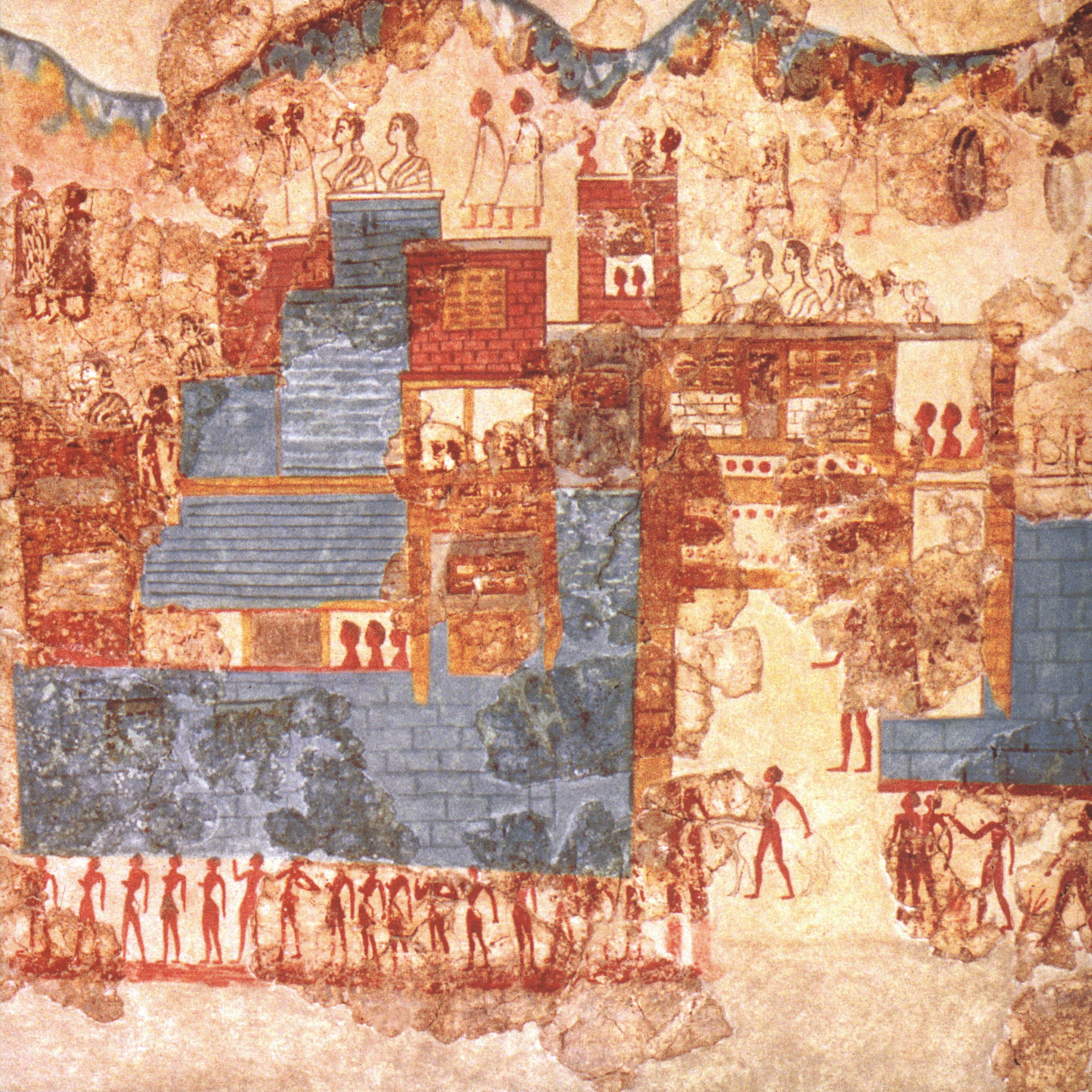 Darstellung einer minoischen Stadt auf dem Schiffsfresko in Raum 5 im Obergeschoss des Westhauses der Ausgrabungsstätte in Akrotiri auf Santorin, Kykladen, Griechenland